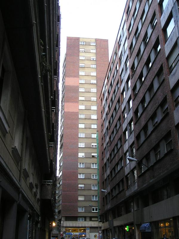 Etxetxuko dorretako bat.